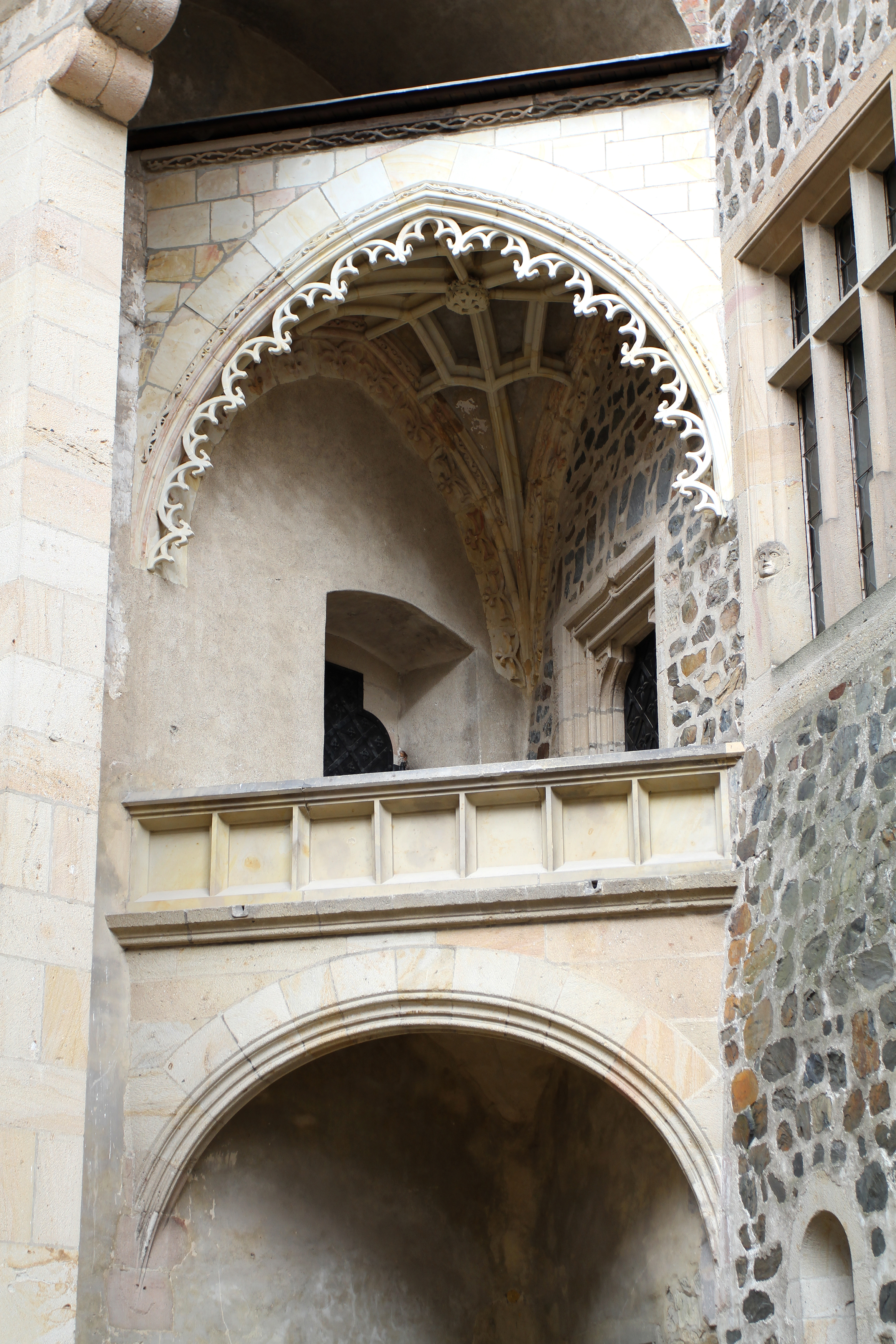 Hrad Křivoklát (Křivoklát), Křivoklát 47